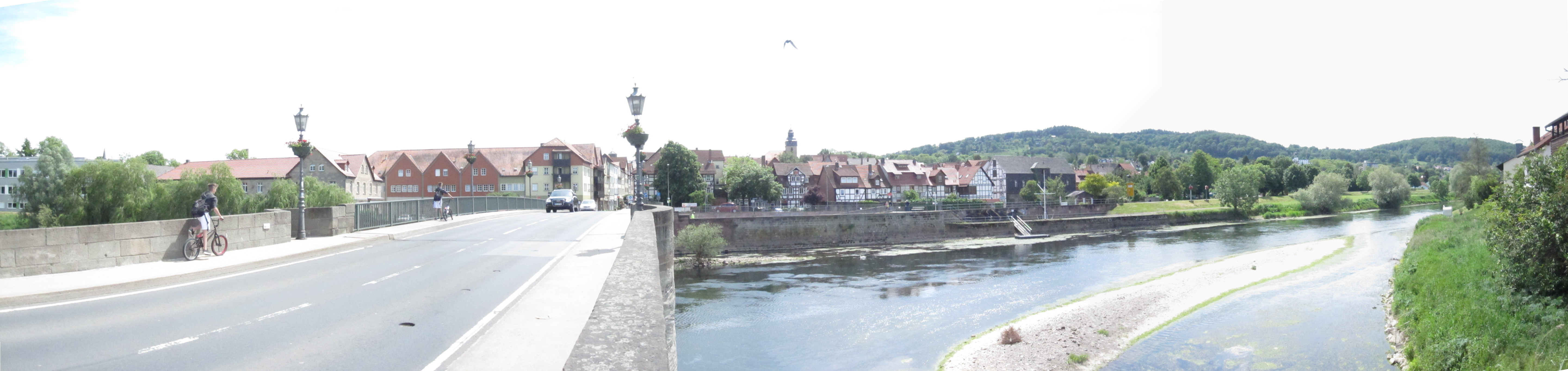 Witzenhausen: Blick über die Werrabrücke nach Süden auf die Altstadt.